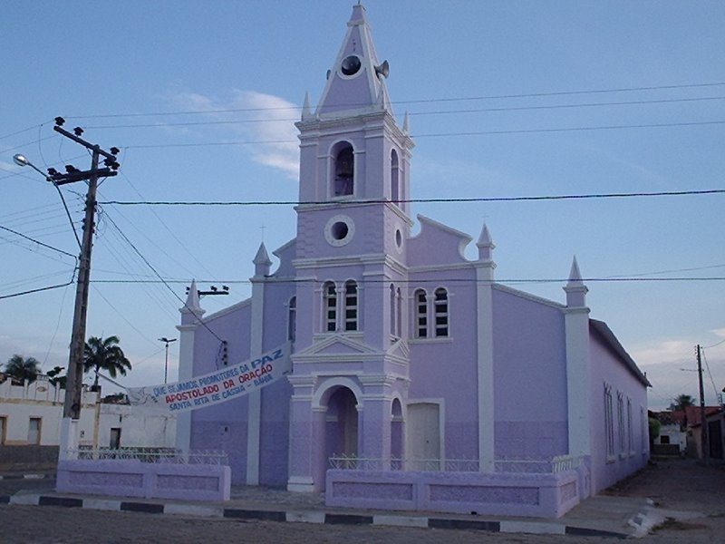 Foto da Igreja Matriz da Paróquia do município de Santa Rita de Cássia - BA.